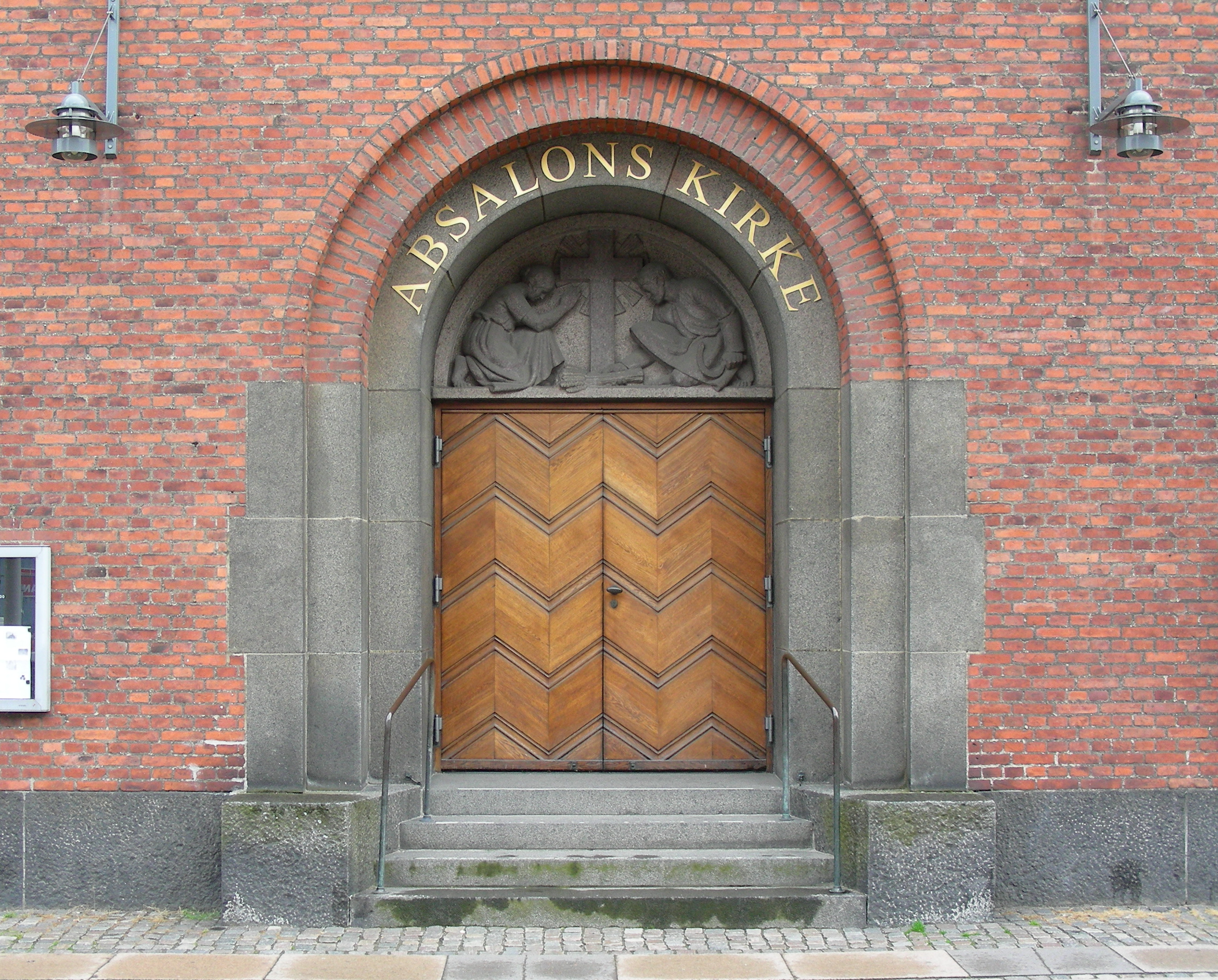 Absalons Kirke, Copenhagen, Denmark. Entrance.